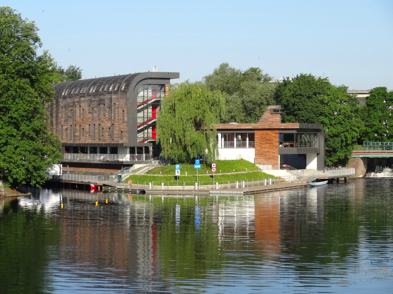 Przystań Bydgoszcz na Wyspie Młyńskiej